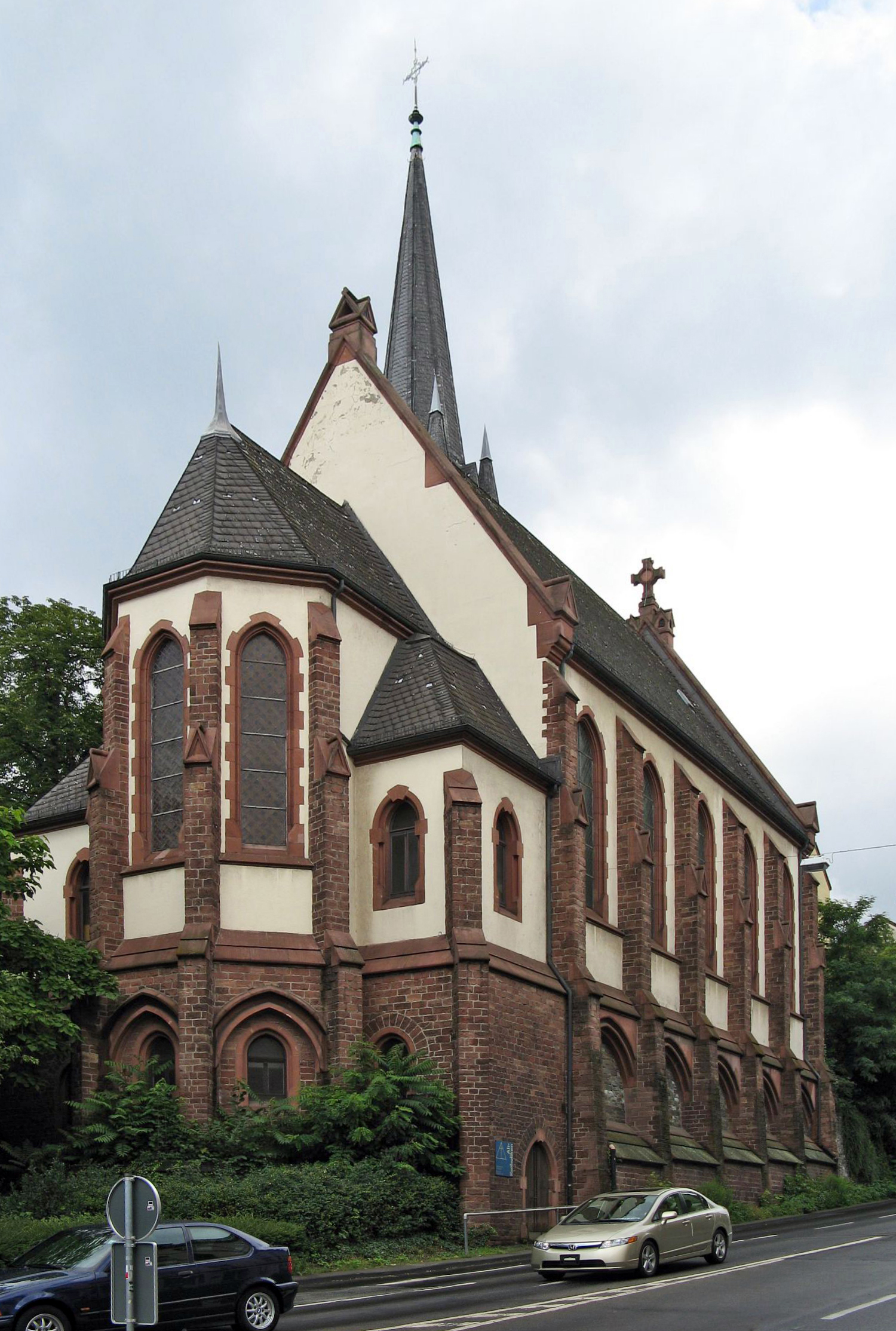 Altkatholische Kirche in Wiesbaden, erbaut 1898 bis 1900